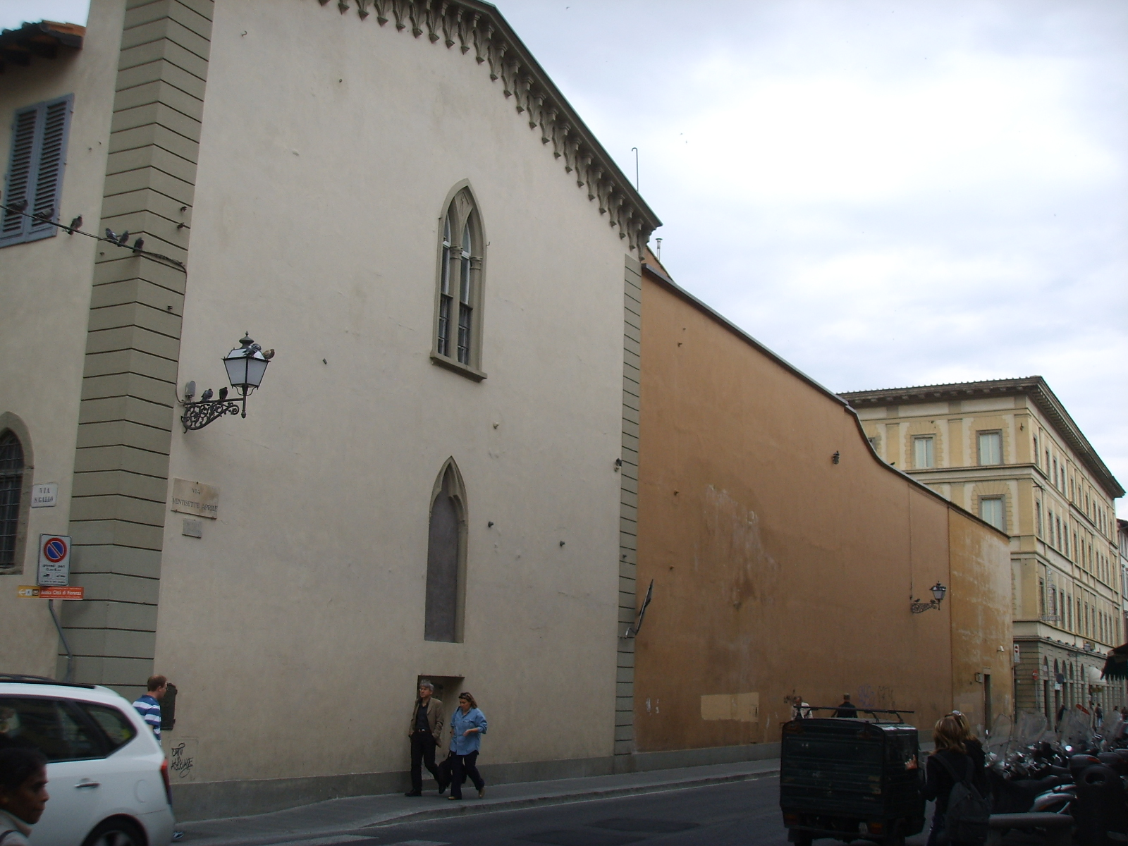 Santa apollonia, esterno